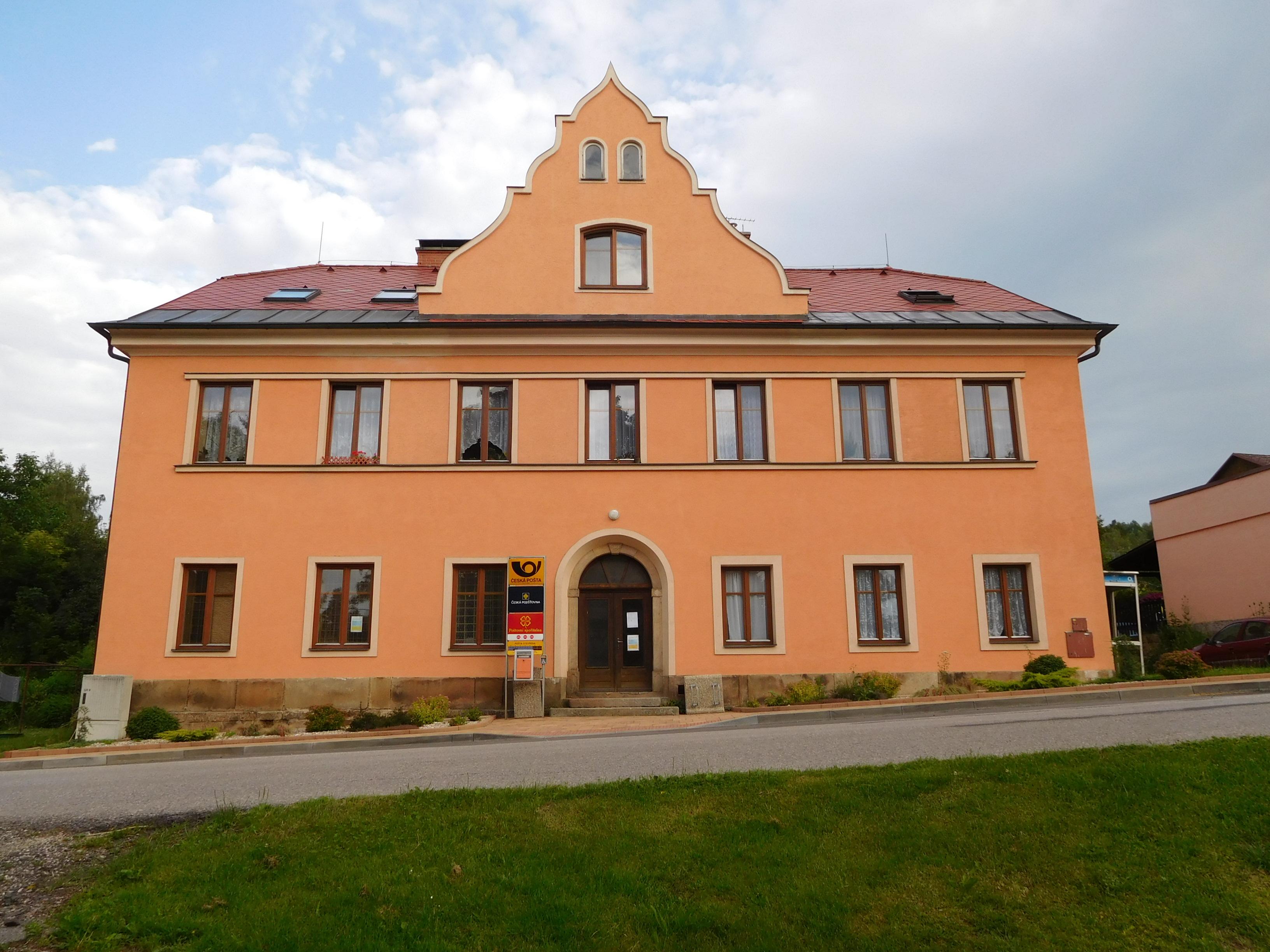 Horní Brusnice - pošta (č.p. 241)